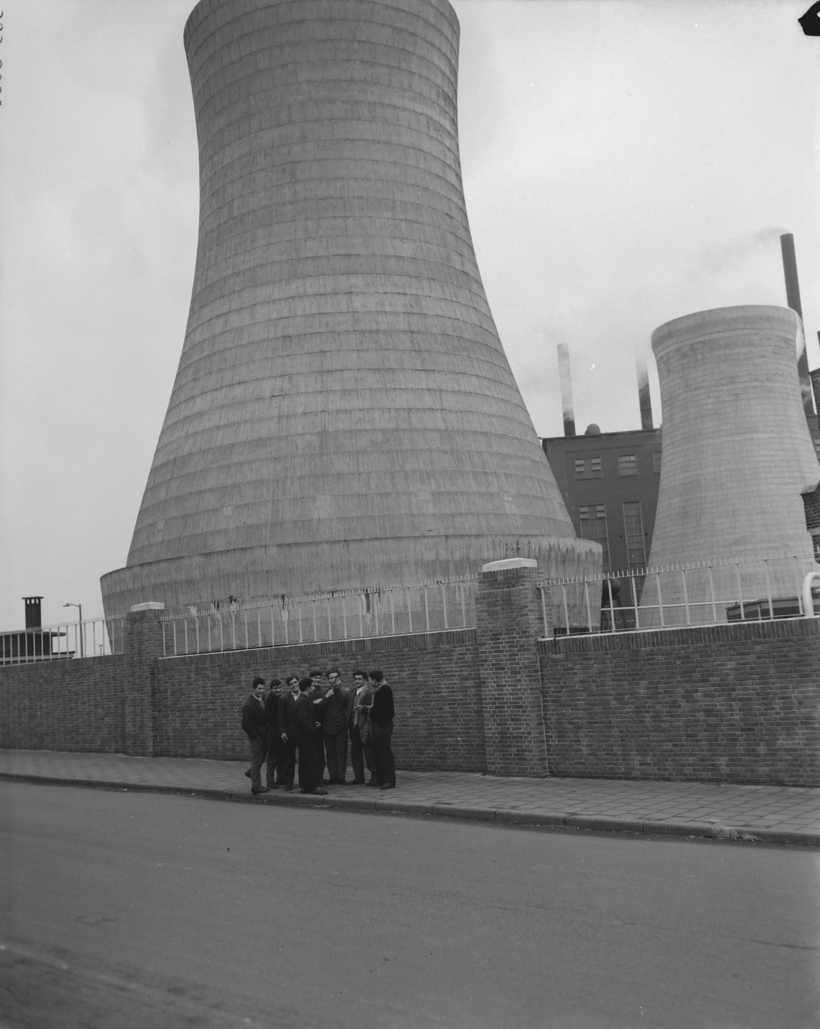 Collectie / Archief : Fotocollectie Anefo Reportage / Serie : [ onbekend ] Beschrijving : Waterdoorbraak in de mijn "Julia" te Eygelshoven Datum : 4 februari 1958 Locatie : Eygelshoven Fotograaf : Behrens, Herbert / Anefo Auteursrechthebbende : Nationaal Archief Materiaalsoort : Negatief (zwart/wit) Nummer archiefinventaris : bekijk toegang 2.24.01.04 Bestanddeelnummer : 909-3064